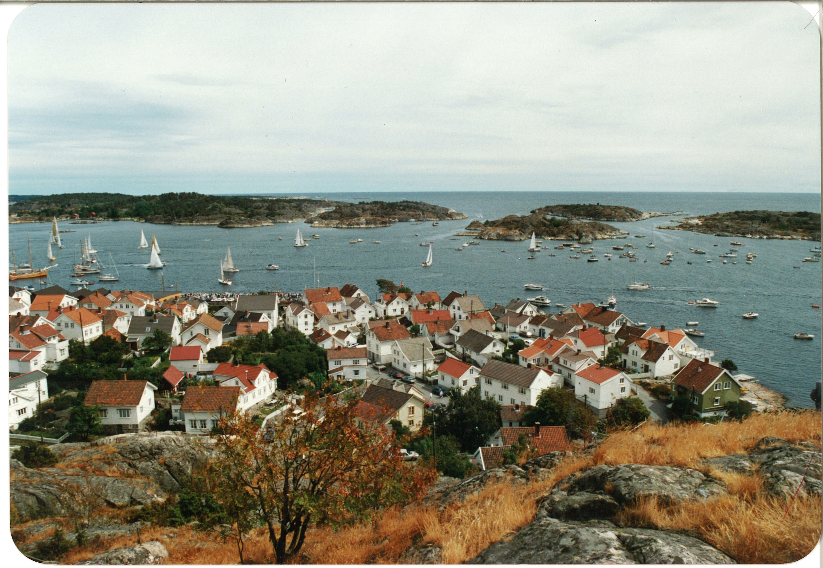 Regatta i Risør juli 1989